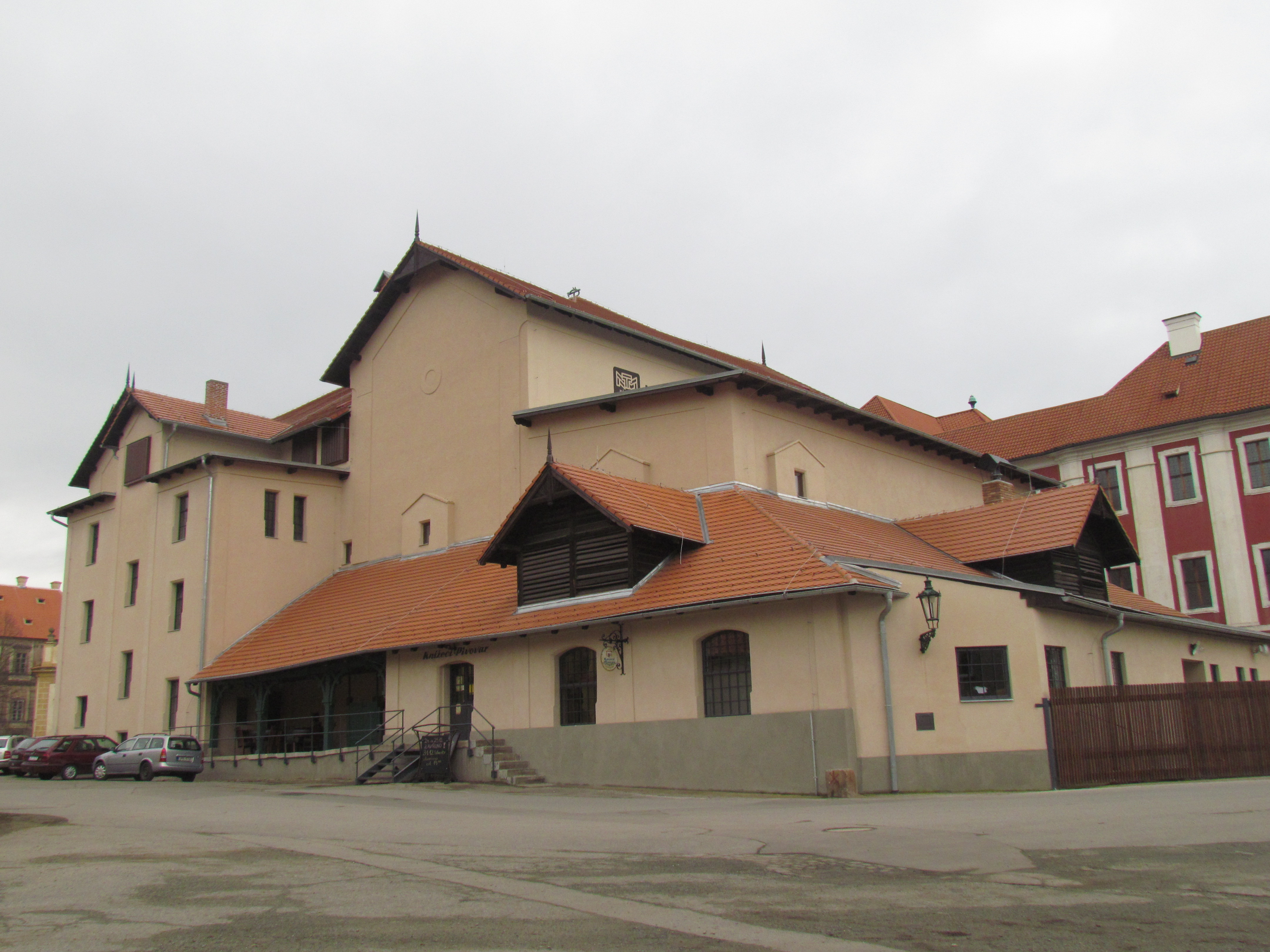 Budova Knížecího pivovaru Plasy